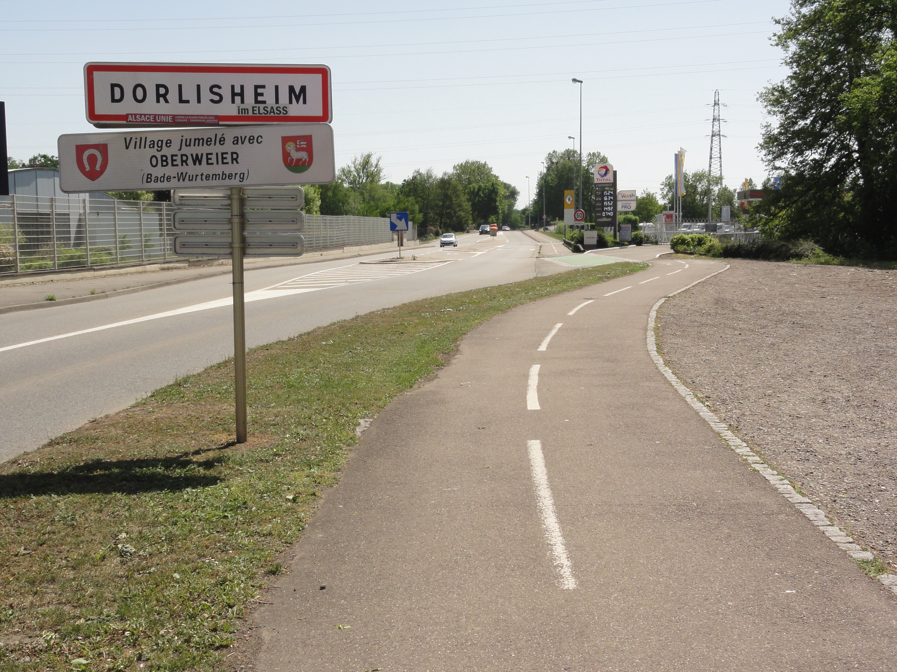 Dorlisheim (Bas-Rhin) city limit sign